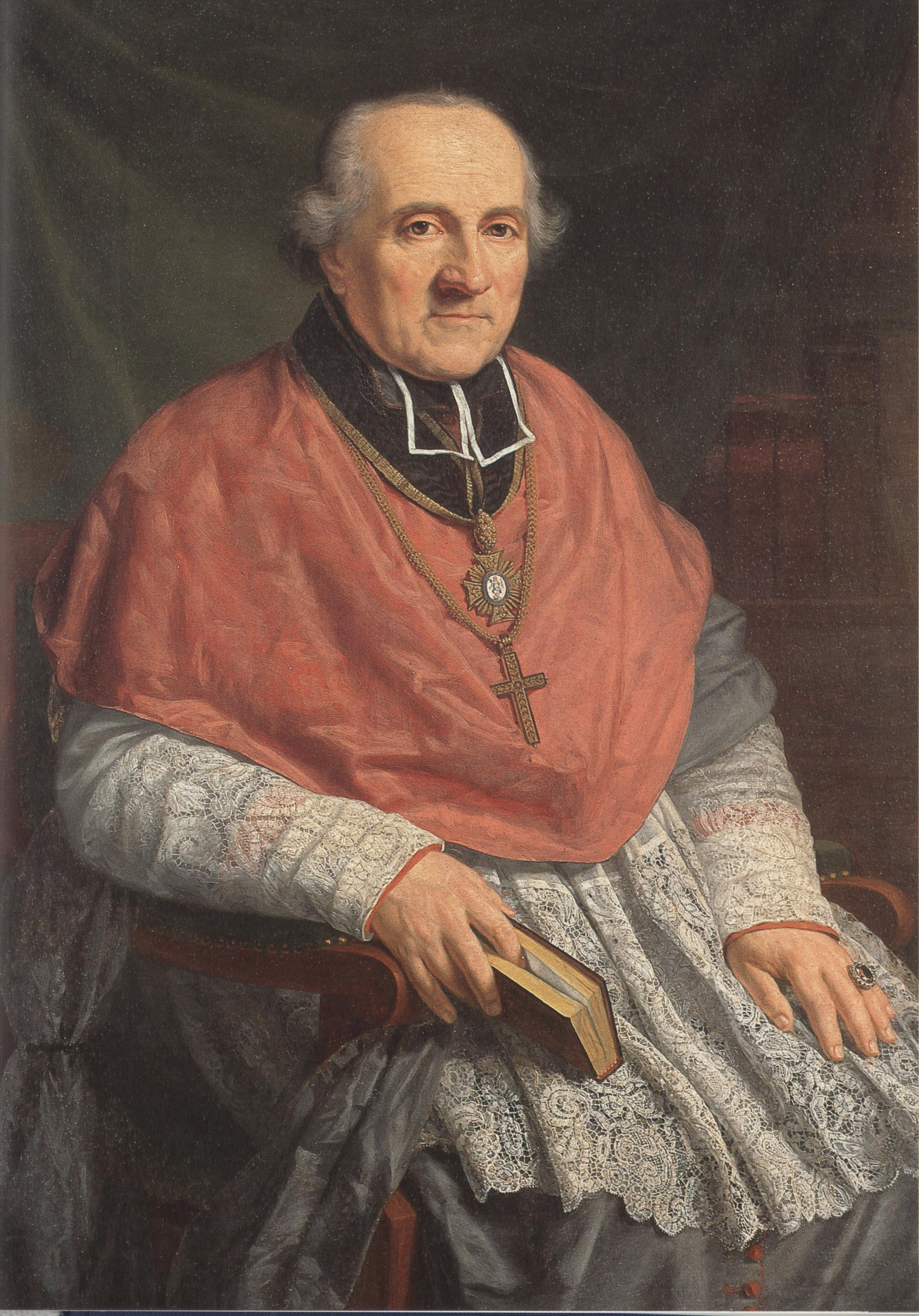 Joseph von Heckenstaller, Apostolischer Vikar des Bistums Freising